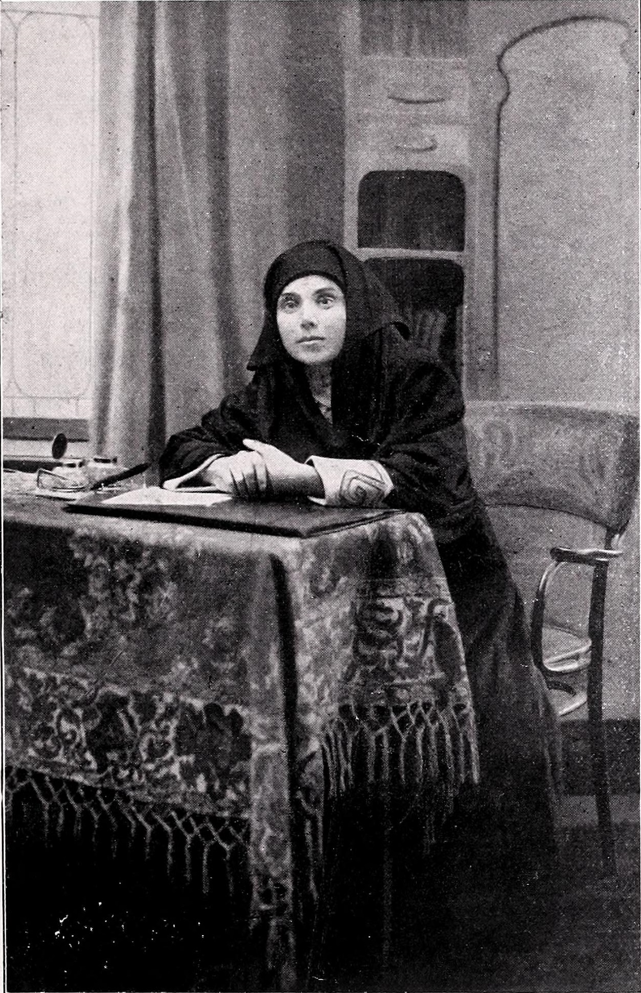 Turkish Muslim woman